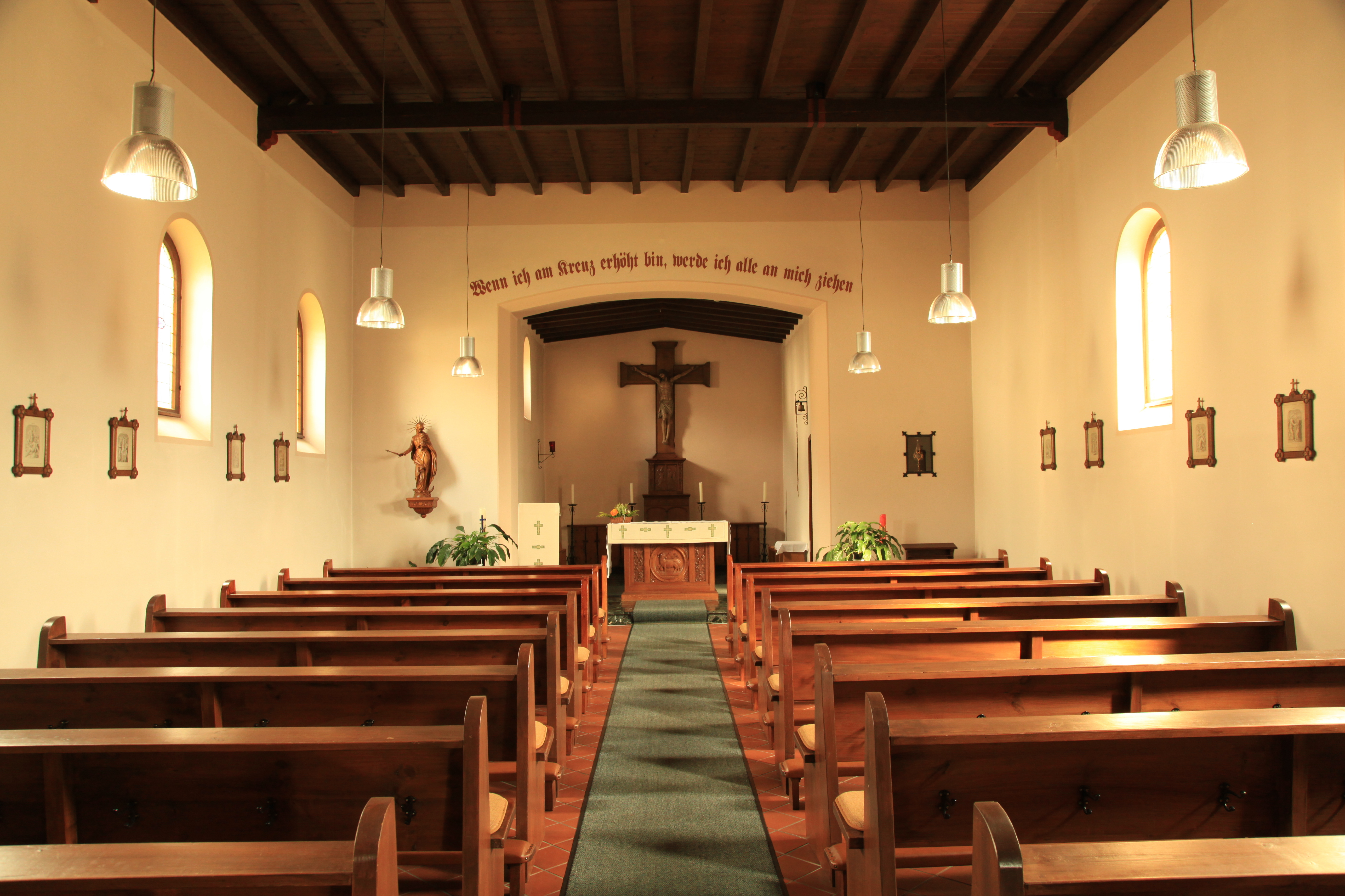 Heilig-Kreuz-Kirche, Kapellenweg 2 / An der Scherf in Odenthal-Klasmühle